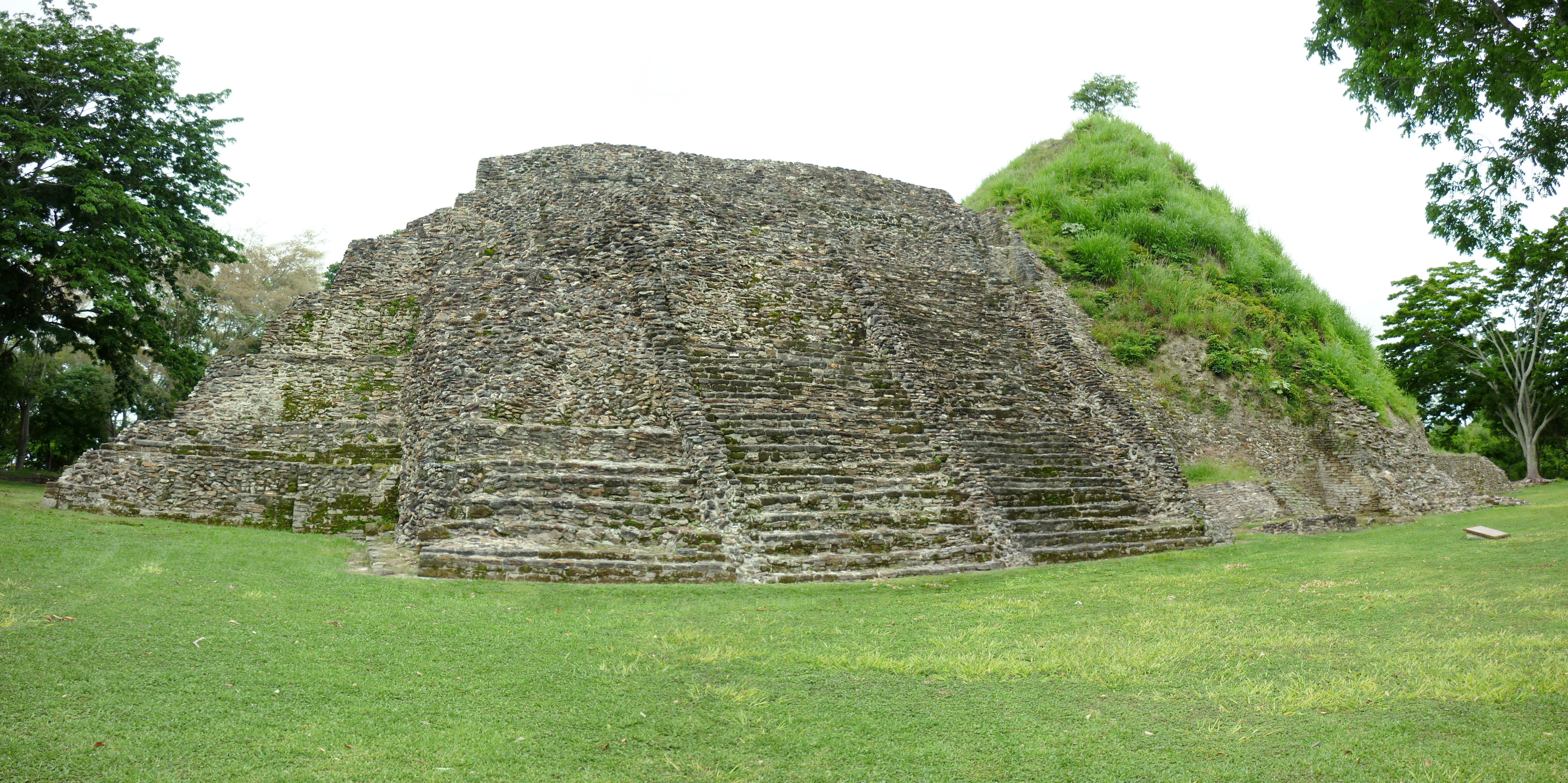 Zona Arqueológica De Moral-Reforma, Balancán